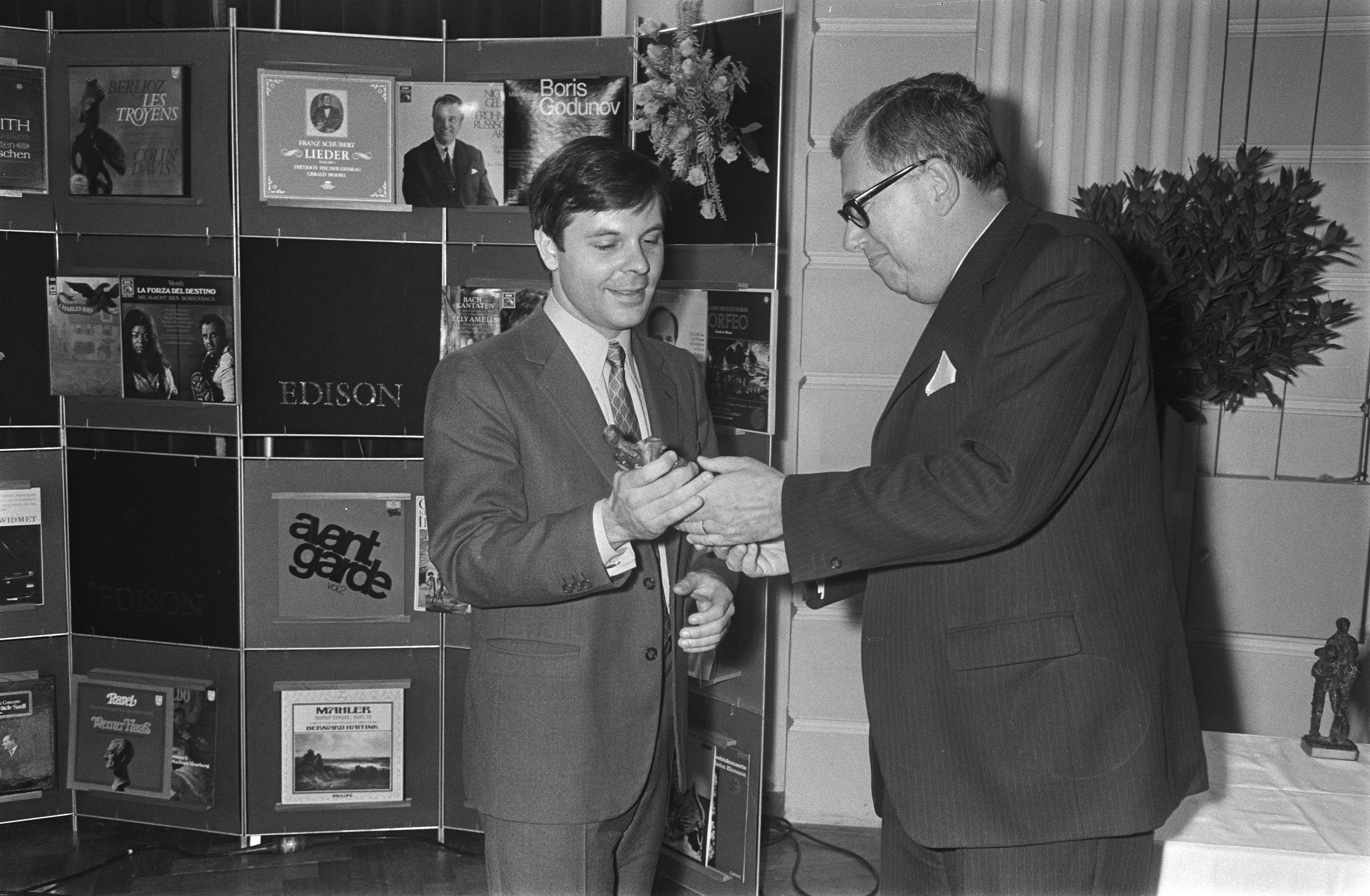 Collectie / Archief : Fotocollectie Anefo Reportage / Serie : [ onbekend ] Beschrijving : Edisons klassiek 1970 zijn uitgereikt in Concertgebouw, Amsterdam; links Stephen Kovacevich (Bishop) Datum : 16 oktober 1970 Locatie : Amsterdam, Noord-Holland Persoonsnaam : Edisons klassiek Fotograaf : Koch, Eric / Anefo Auteursrechthebbende : Nationaal Archief Materiaalsoort : Negatief (zwart/wit) Nummer archiefinventaris : bekijk toegang 2.24.01.05 Bestanddeelnummer : 923-9297 Reacties Geplaatst door Cultuurmens op 08 februari 2017 - 15:25. Dit is Stephen Bishop, pianist (Amerikaans) dus niet de bariton Dietrich Fischer-Dieskau